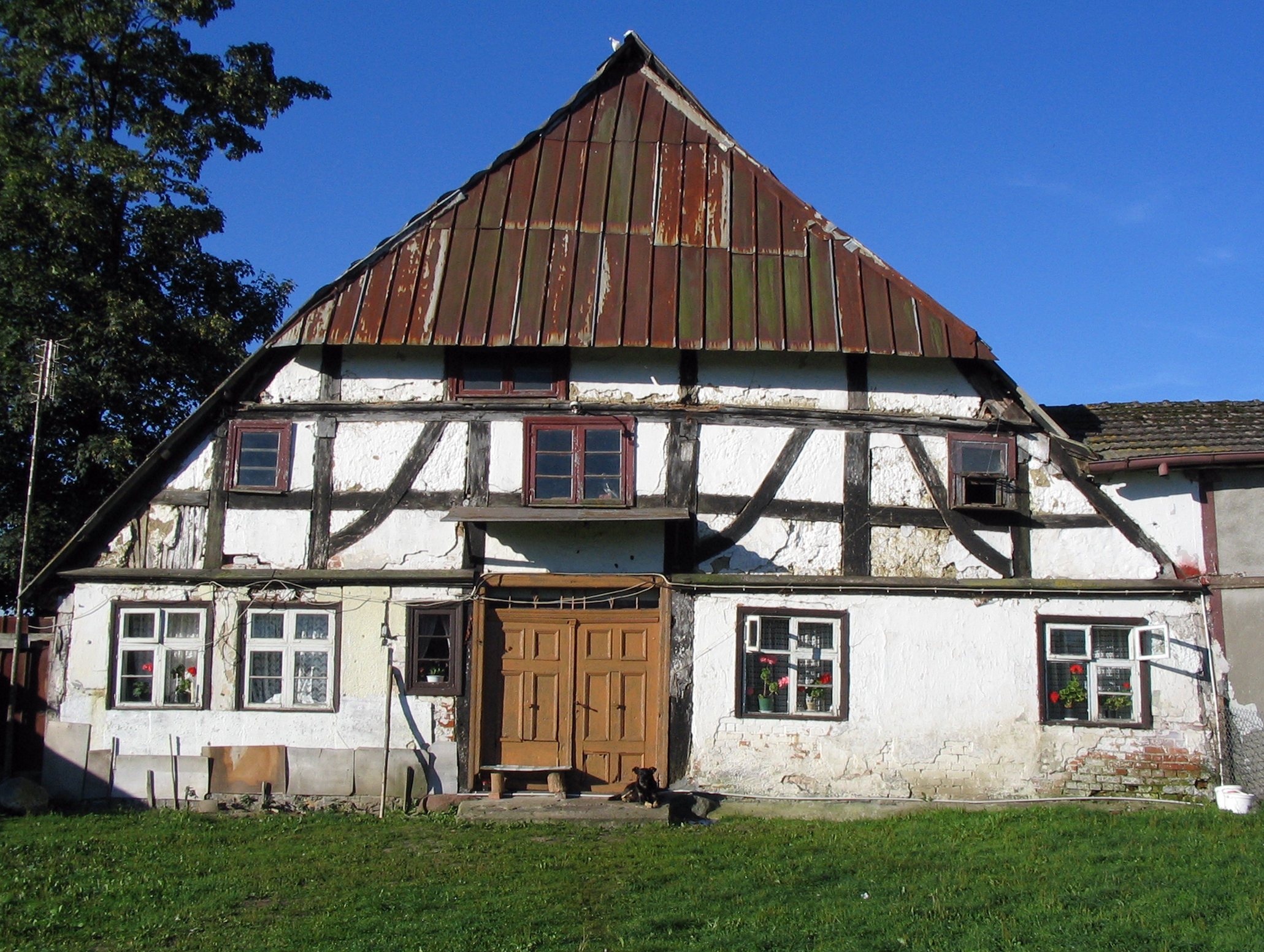 XVII-wieczna chałupa na wzorze saskim w Krupach.